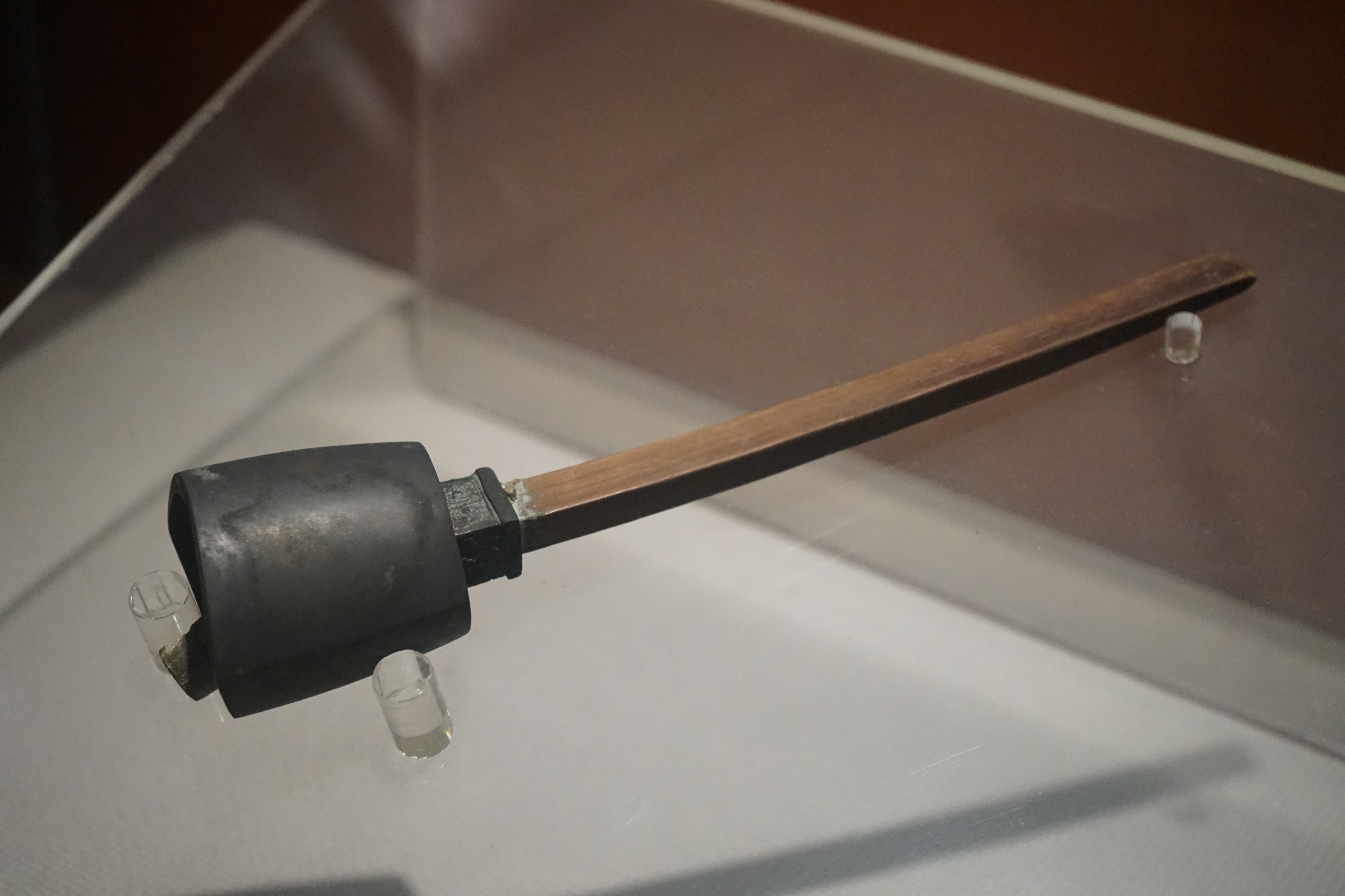 中文（中国大陆）: 青铜铎 春秋战国 印山越国王陵出土